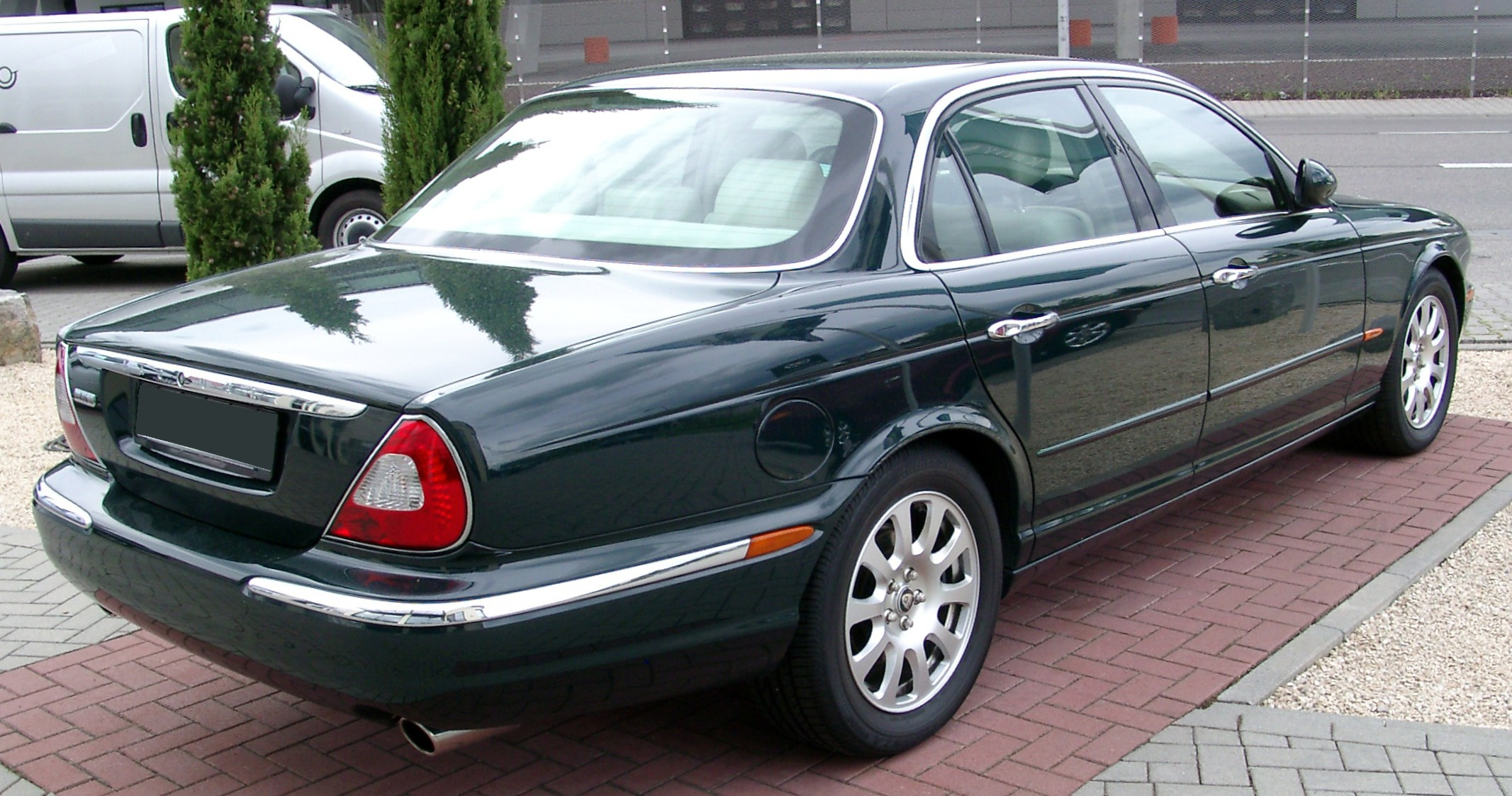 Jaguar XJ6 3.0, Baujahr 2004